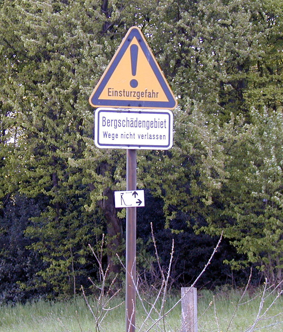 Bergschadenwarnung bei Niedersprockhövel; 2002 selbst fotografiert